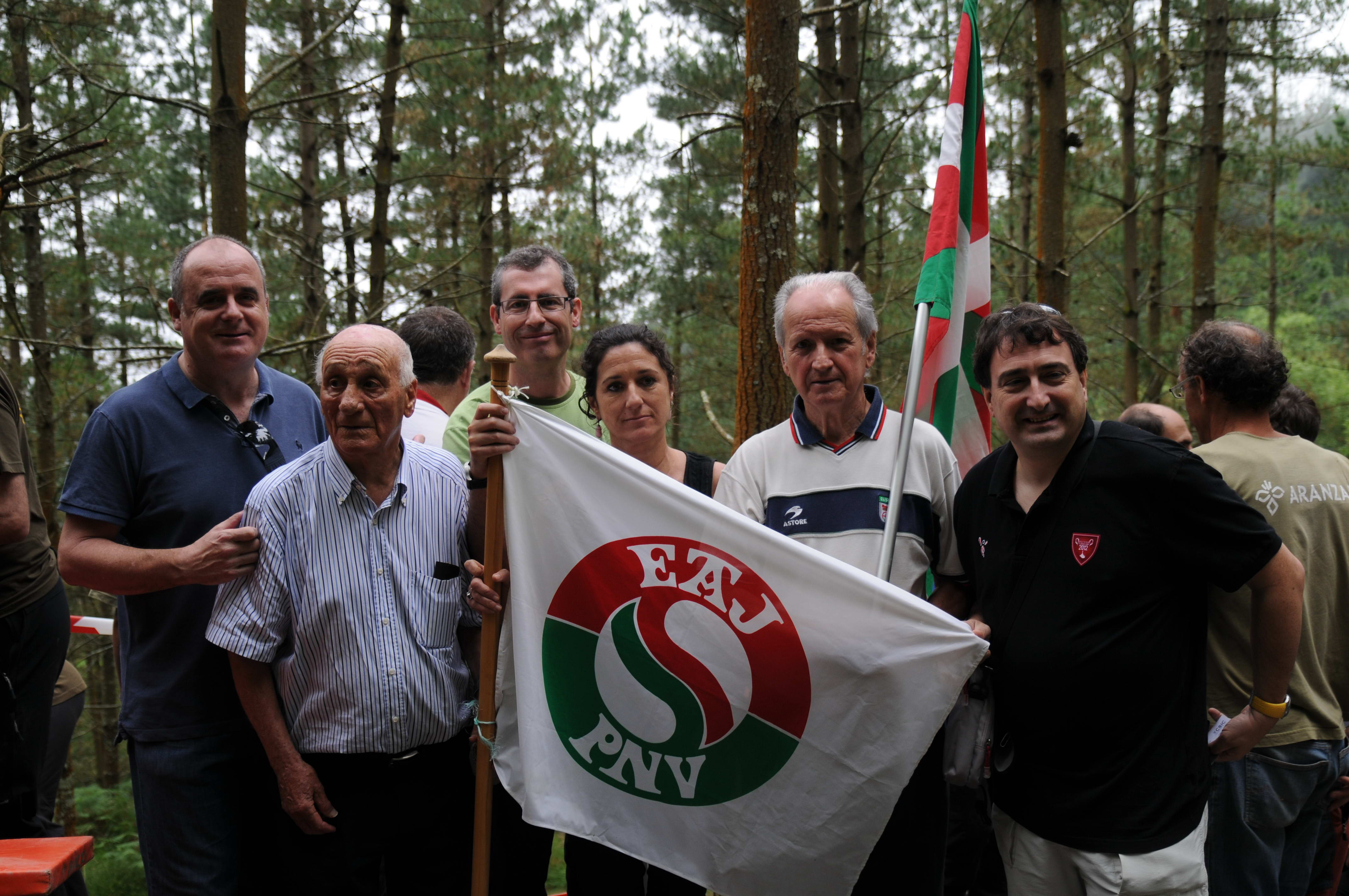 1936an eroritako gudarien hilotzak atertatzeko indusketa-lanak 2012ko ekainean, Elgoibarko Ziardamendin. Argazkian ezkerretik eskuinera Joseba Egibar, Gerardo Bujanda, Markel Olano, Idoia Elorza, Juan Mari Atutxa eta Aitor Esteban